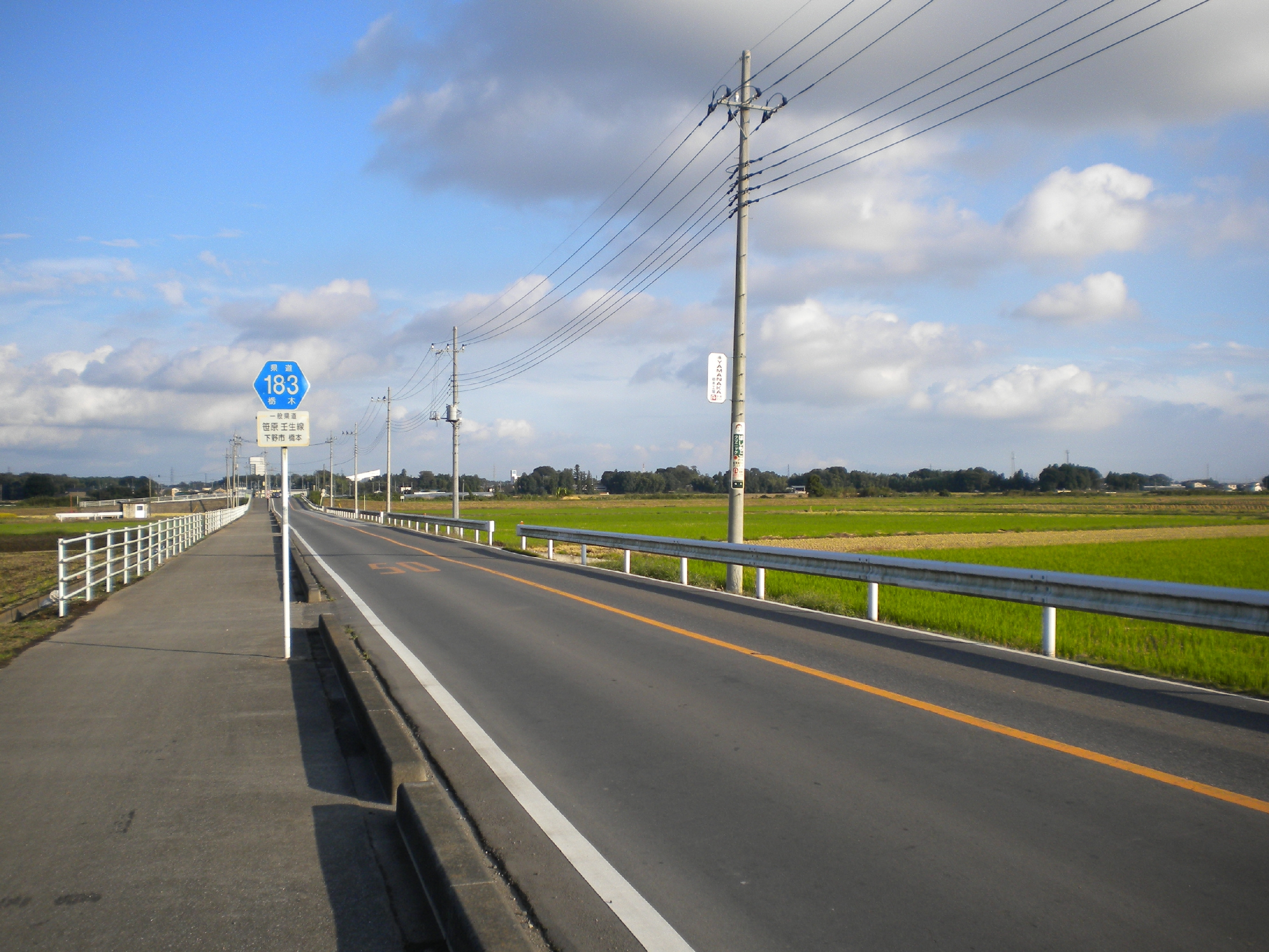 栃木県道183号笹原壬生線 栃木県下野市橋本